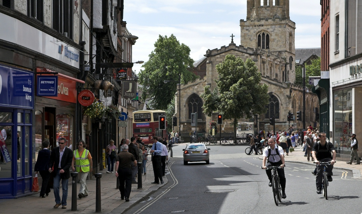 Pavement York IMG_4861-01